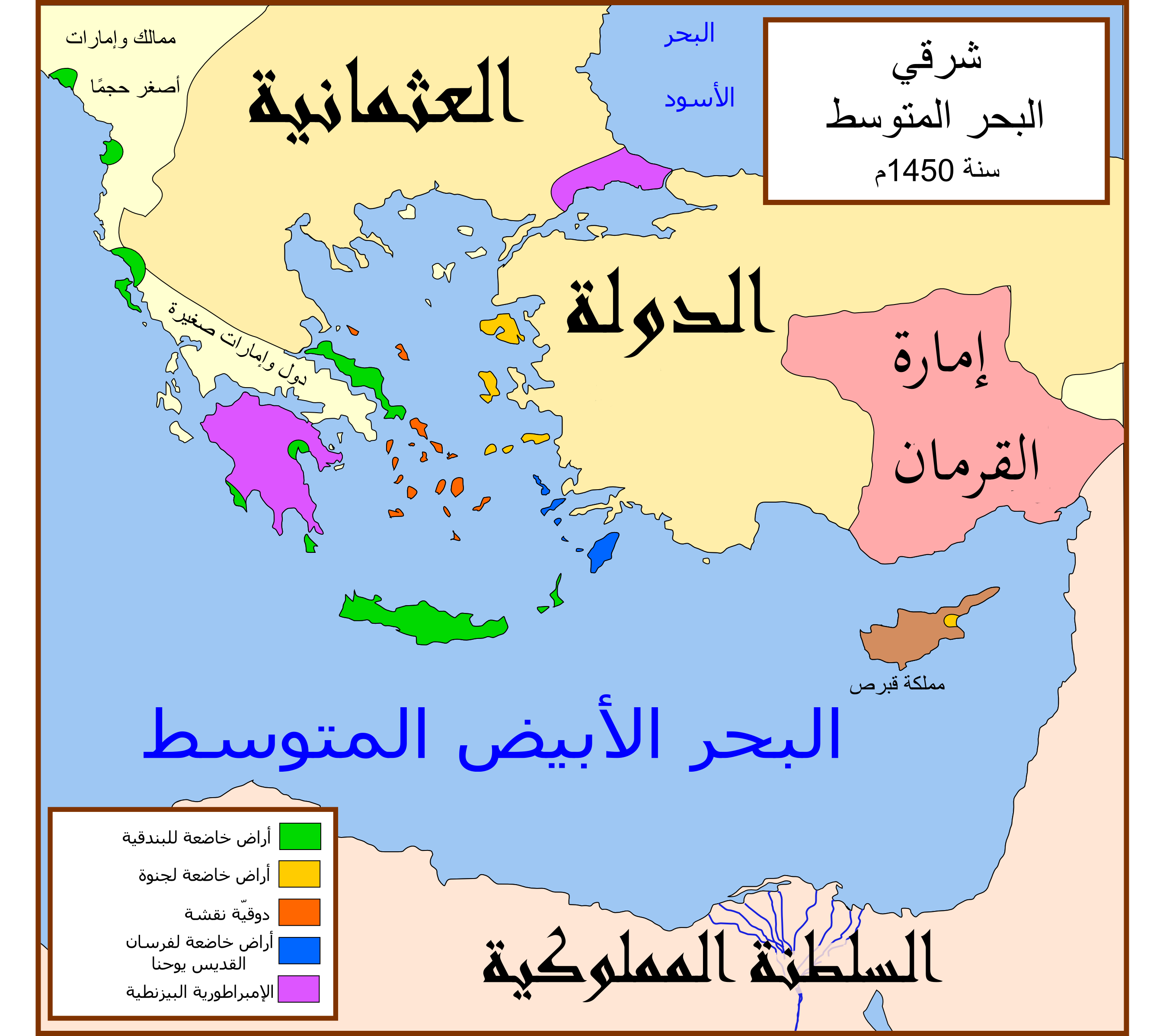 شرق المتوسط عام 1450 ميلادي